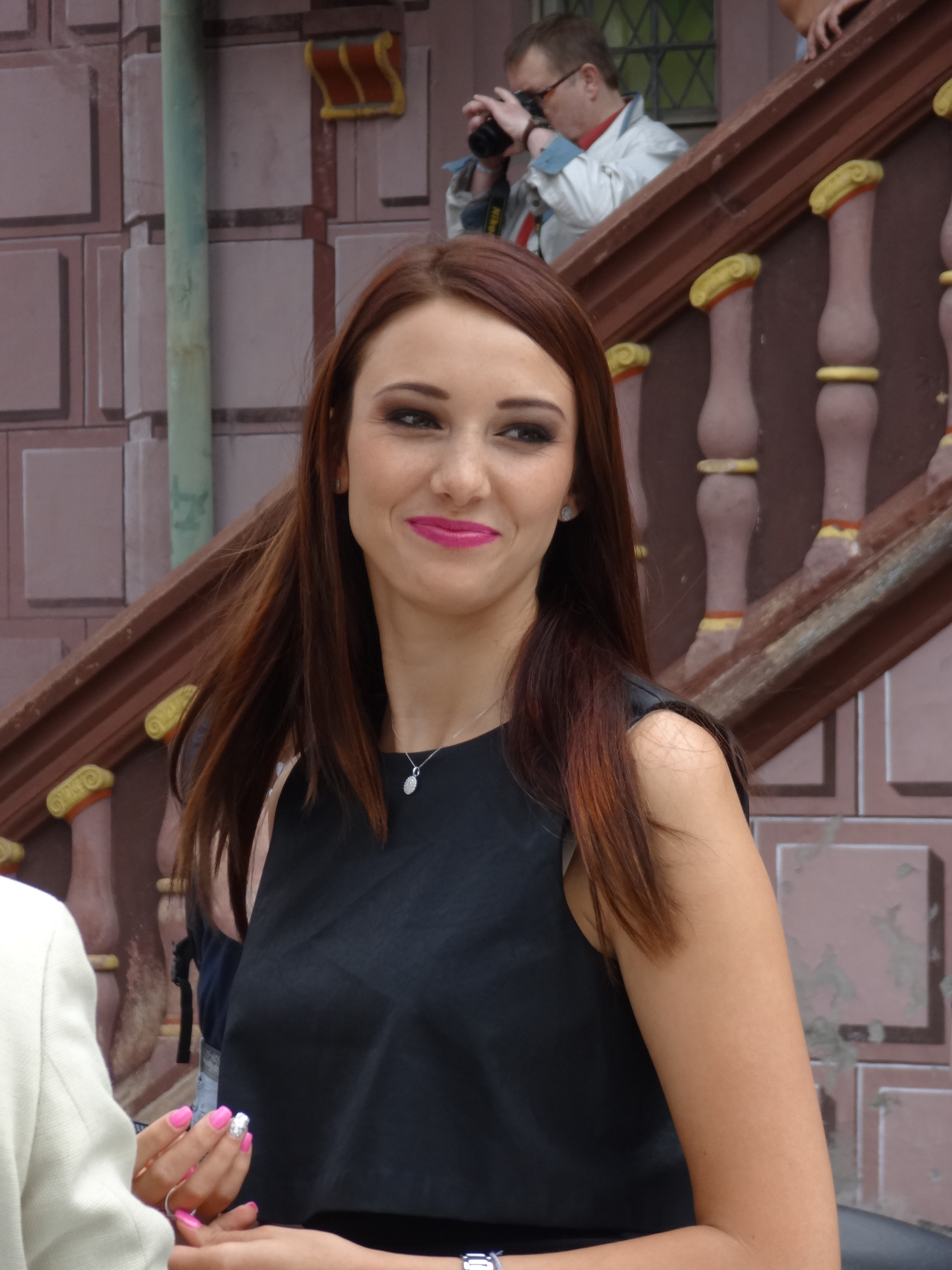 Delphine Wespiser devant l'hôtel de ville de Mulhouse, à l'inauguration du "Festival Automobile".